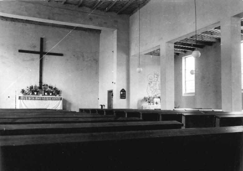 Illus-Biscan 12.5.51 Gr.-Jst. Eine neue katholische Kirche in Magdeburg. Aus den Abbruchsteinen einer durch Bomben anglo-amerikanischer Flieger zerstörten deutsch-reformierten Kirche wurde in Magdeburg-Cracau eine neue katholische Kirche, die St.Andreas-Kirche, errichtet. Die neue Kirche, die bereits in Benützung genommen wurde, ist in einem einfachen modernen Baustil errichtet, hat ein Haupt- und ein Nebenschiff und etwa 300 Plätze. Mit den anderen inzwischen wieder instandgesetzten Kirchen stehen dem katholischen Teil der Bevölkerung Magdeburgs nunmehr acht Kirchen zur Verfügung. UBz, Blick in das Innere der St.Andreas-Kirche.